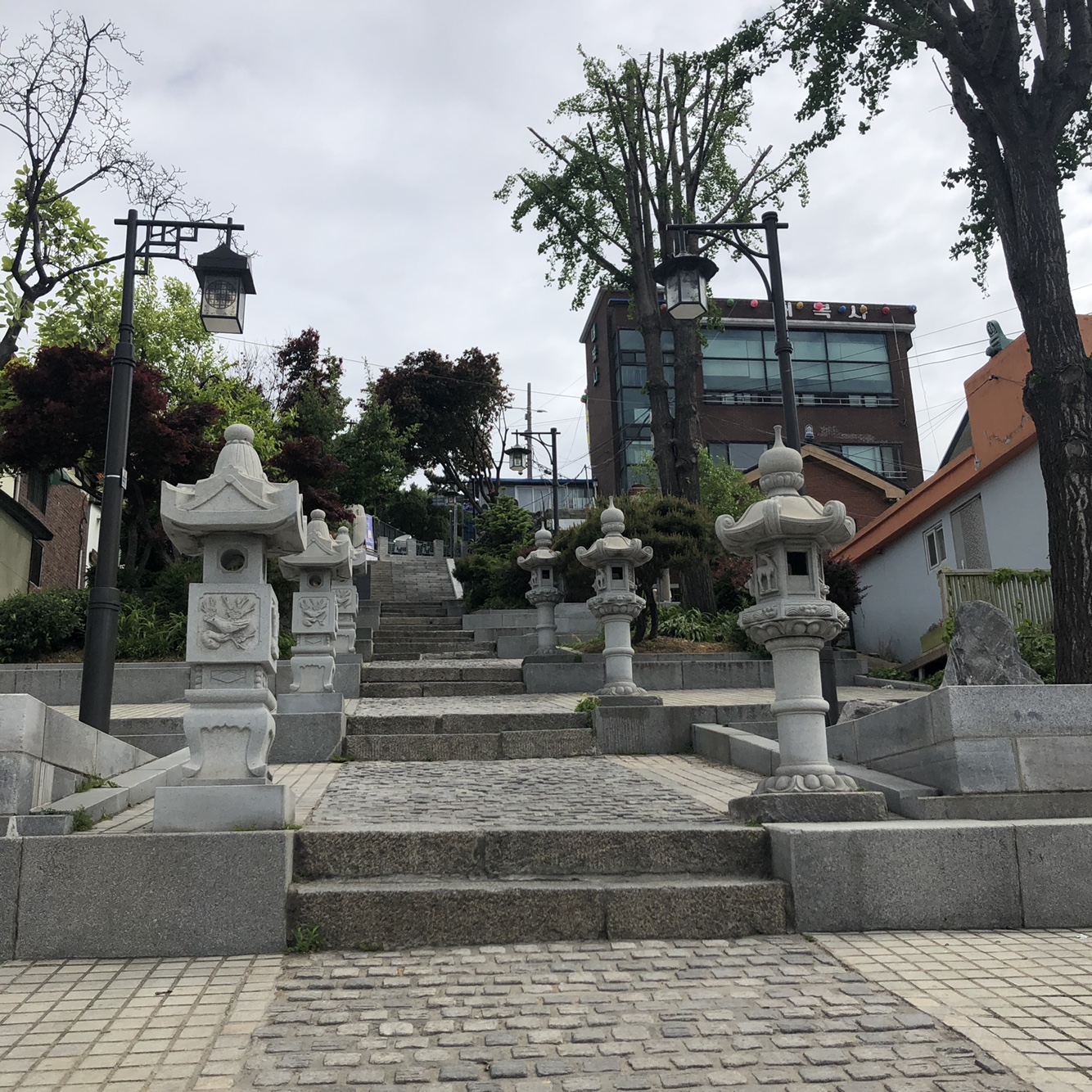 인천 차이나타운에 있는 청일 조계지 경계 계단